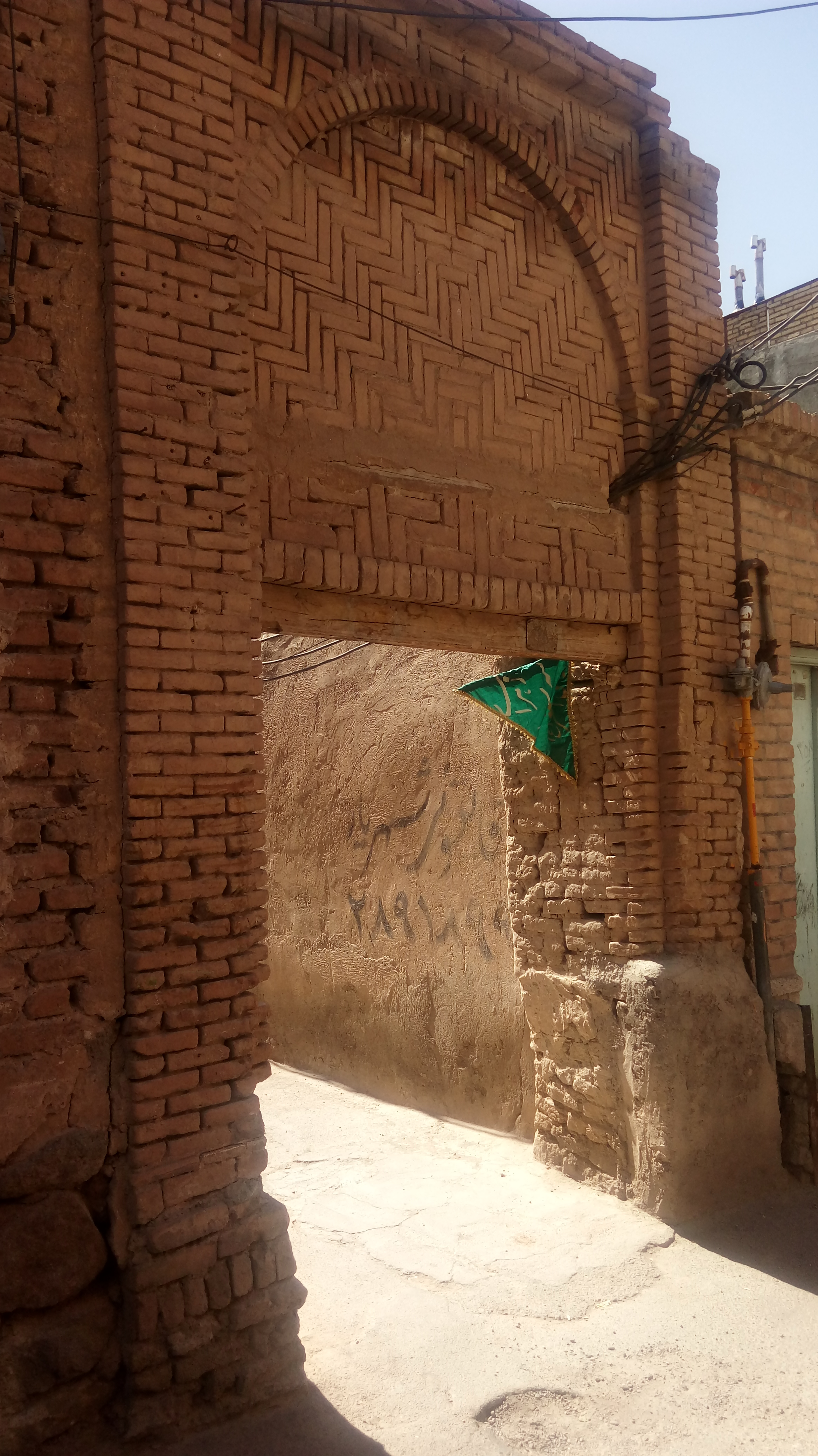 سردرب عمارت میرزاعلی- باش دالان-قراملک تبریز